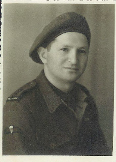 רחבעם עמיר